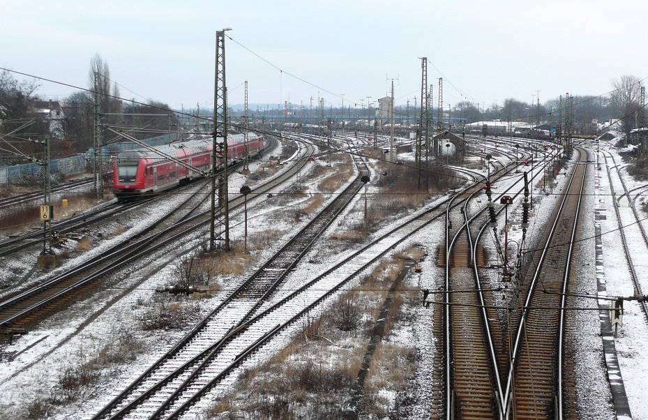 Rangierbahnhof Seelze bei Hannover